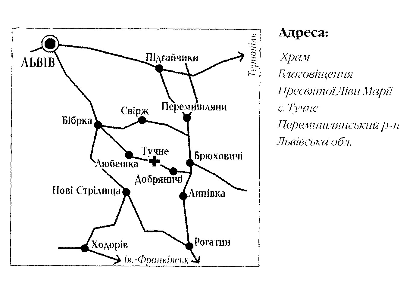 Карта доїзду до c. Тучне Перемишлянського району